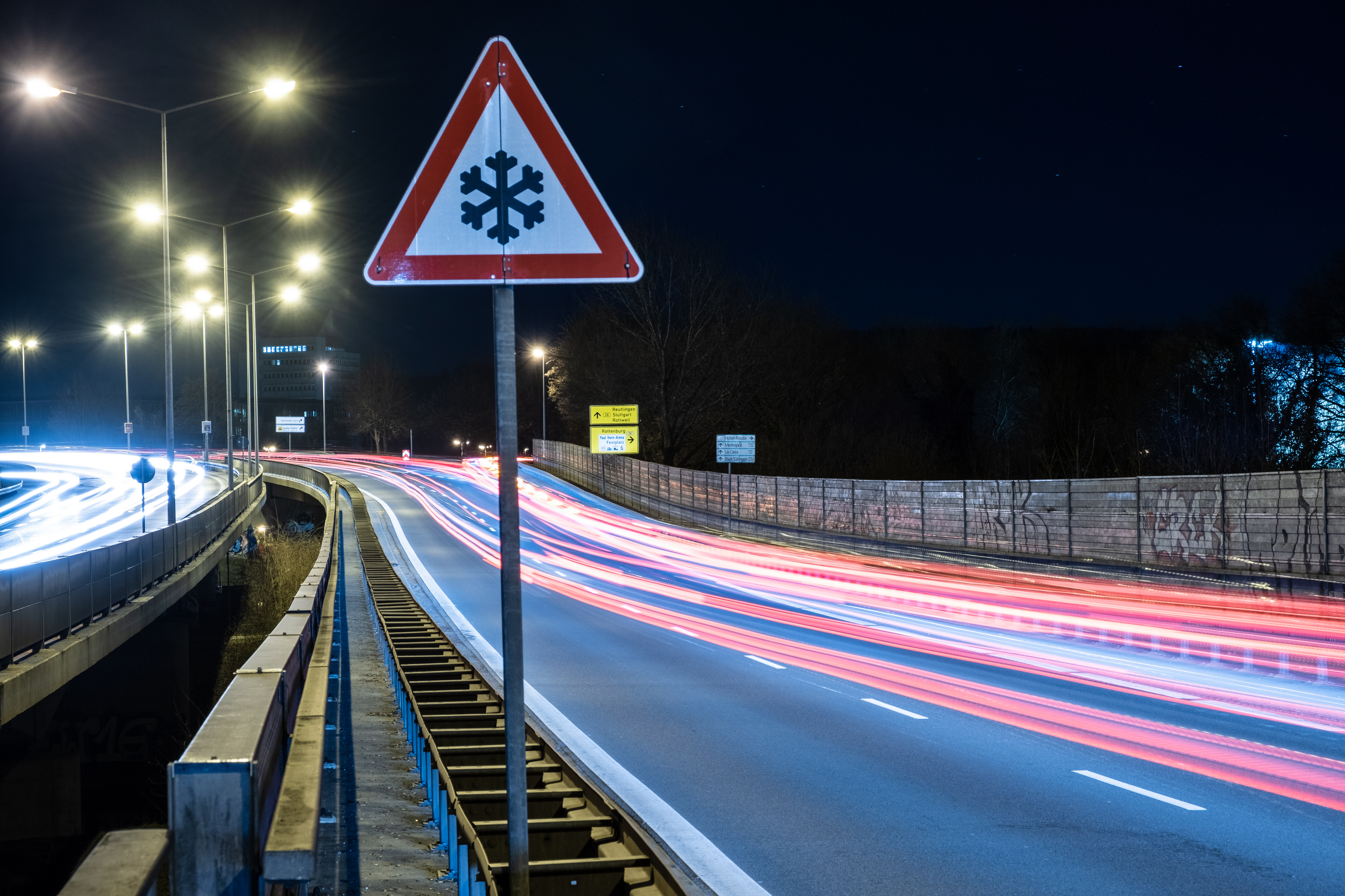 Brücke vor dem Schlossbergtunnel in Tübingen bei Nacht